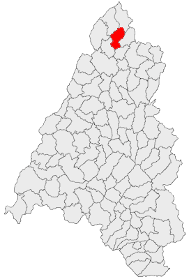 Categorie:Hărţi ale judeţului Bihor